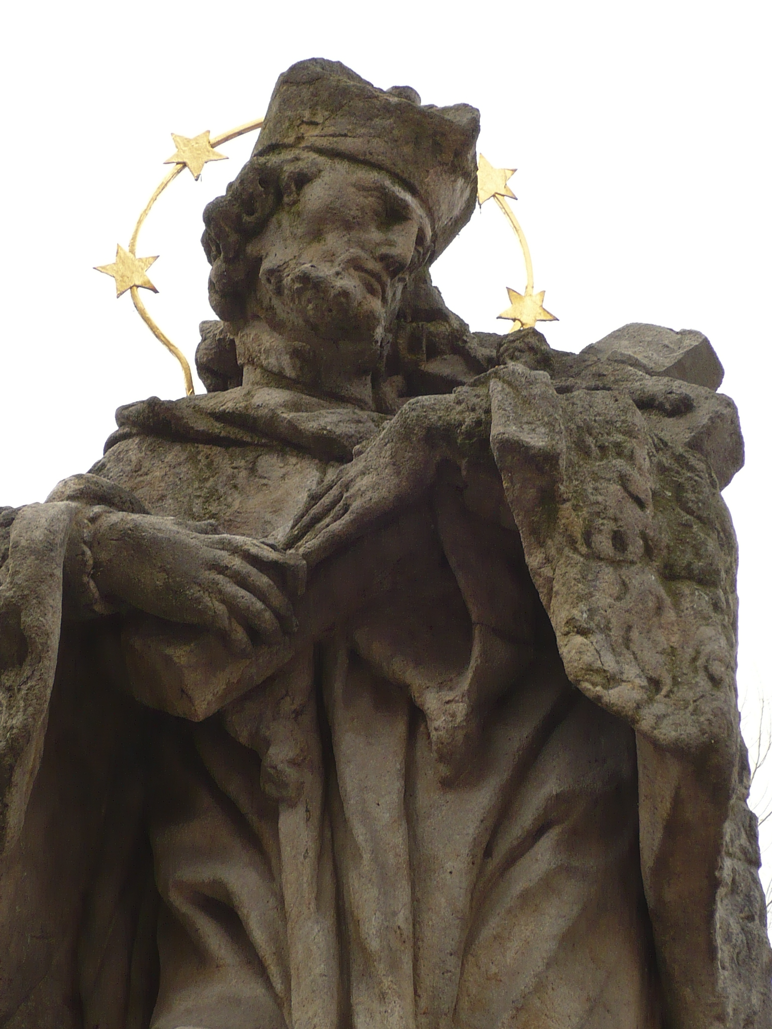 Detail der Johannes-Nepomuk-Statue in der Schuhmacherstrasse (ul. Piastów ) in Neurode (Nowa Ruda), ehemalige Grafschaft Glatz, Niederschlesien, Polen.